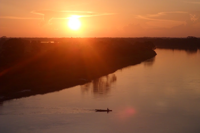 Imagen tomada desde el puente de El Botón de Leyva que conecta a los departamentos de Bolívar y Magdalena, en territorio del municipio de Margarita - Bolívar.